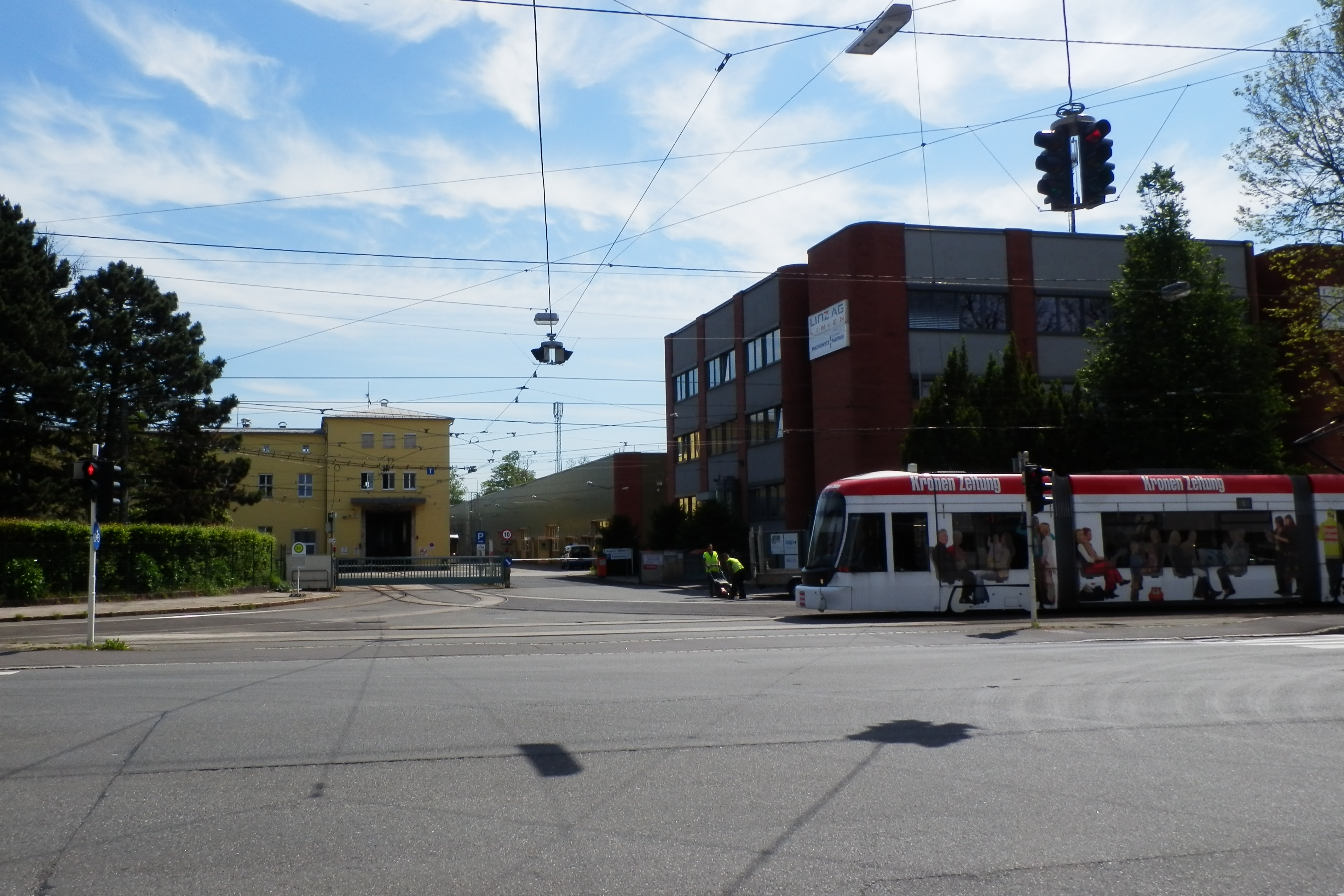 Remise Kleinmünchen - Hauptportal